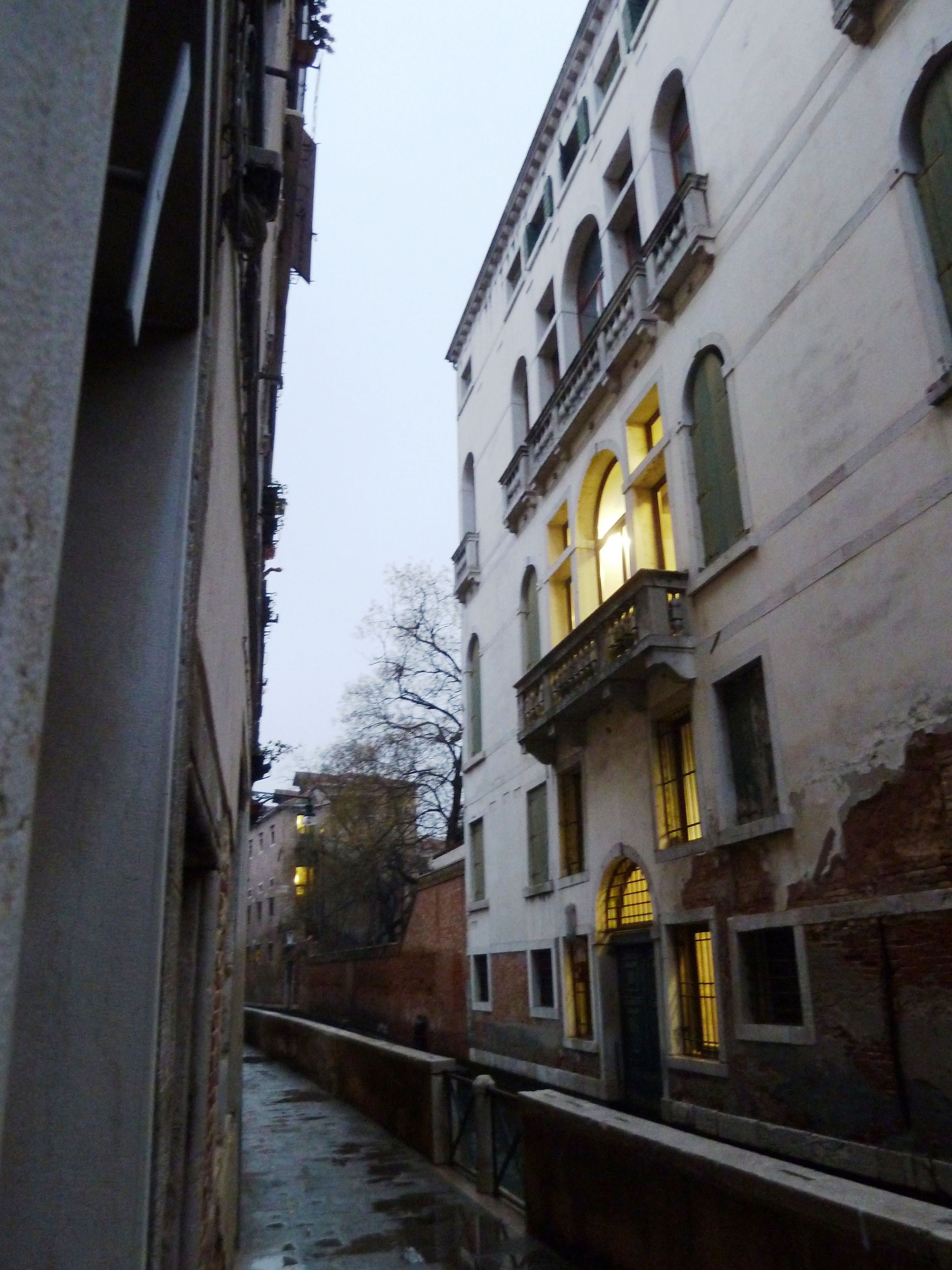 Palazzo Priuli Stazio (Venice)